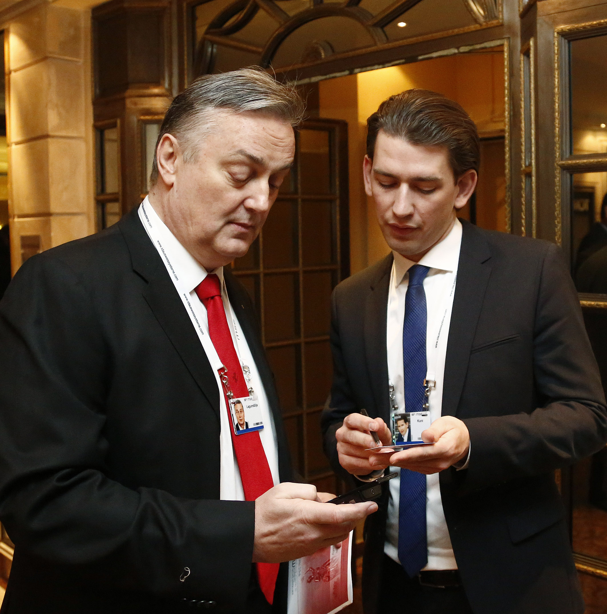 Außenminister Sebastian Kurz trifft im Rahmen der Münchener Sicherheitskonferenz mit dem bosnischen Außenminister, Zlatko Lagumdzija, zusammen. 01.02.2014, München, Foto: Dragan Tatic